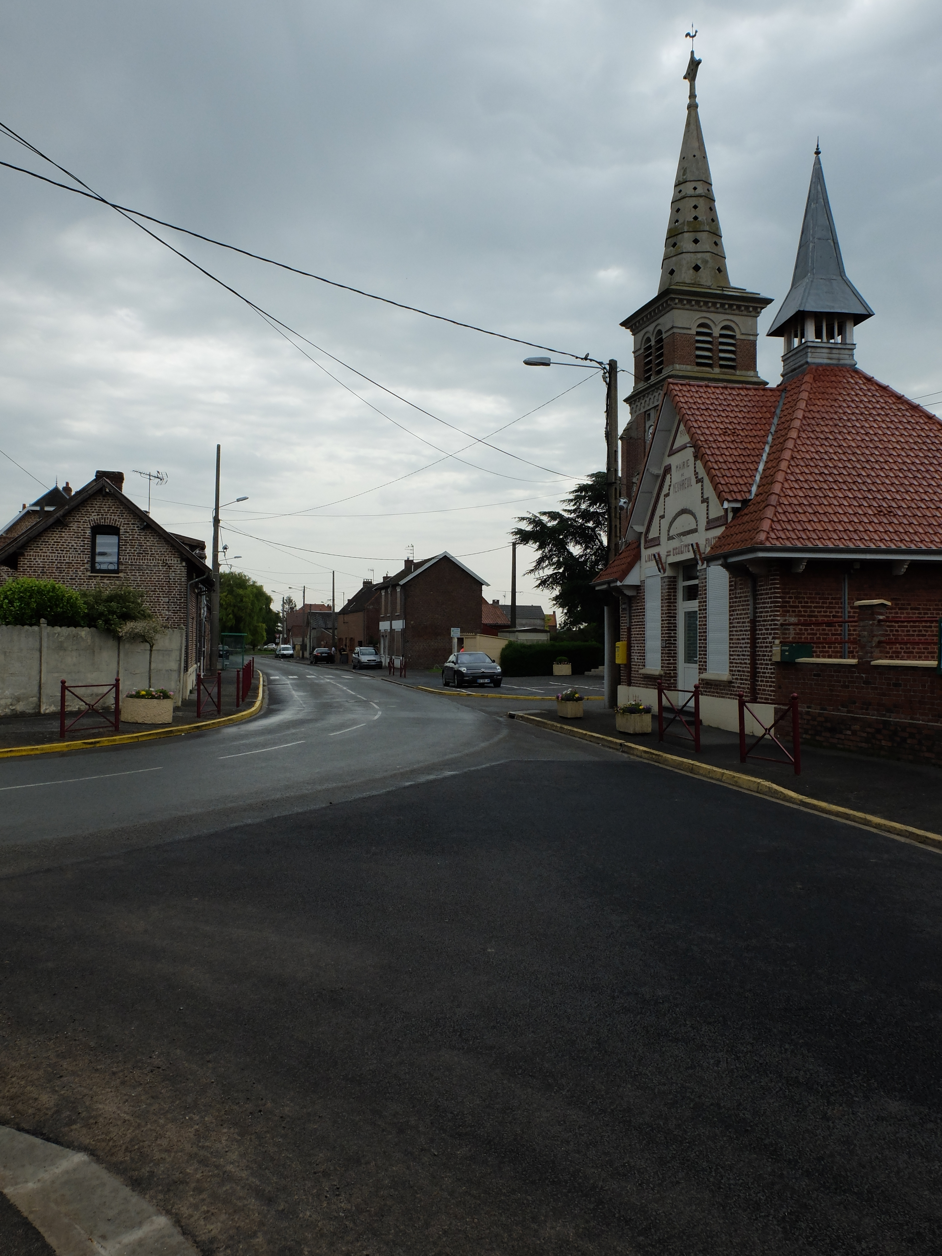 Vue de la Grand rue de Neuvireuil vue de la rue du Four.